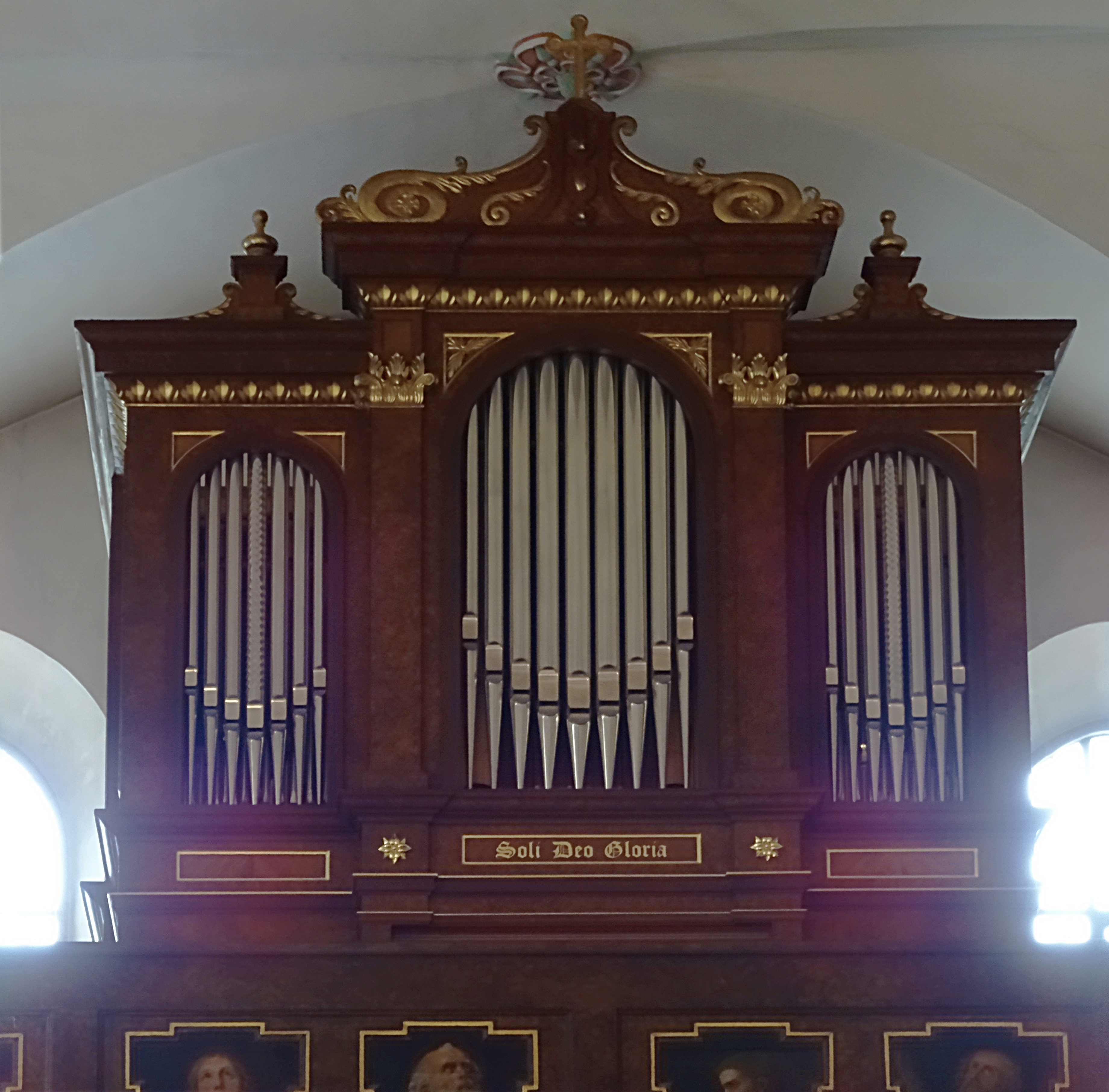 Orgel der Klosterkirche auf dem Kreuzberg (Rhön) von Hey Orgelbau 2005 + Franz Hochrein 1887